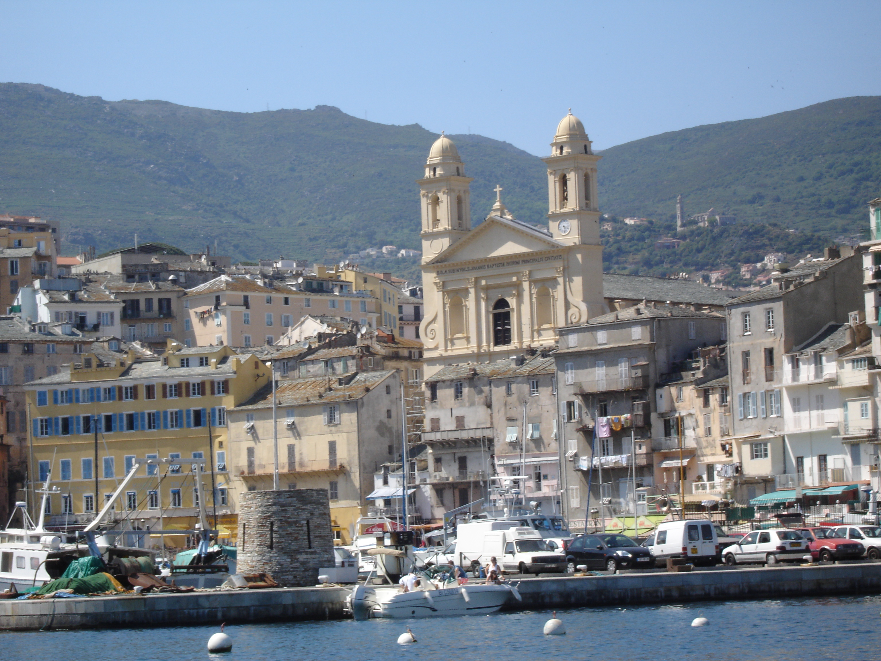 Vieux port de Bastia et Église Saint-Jean-Baptiste